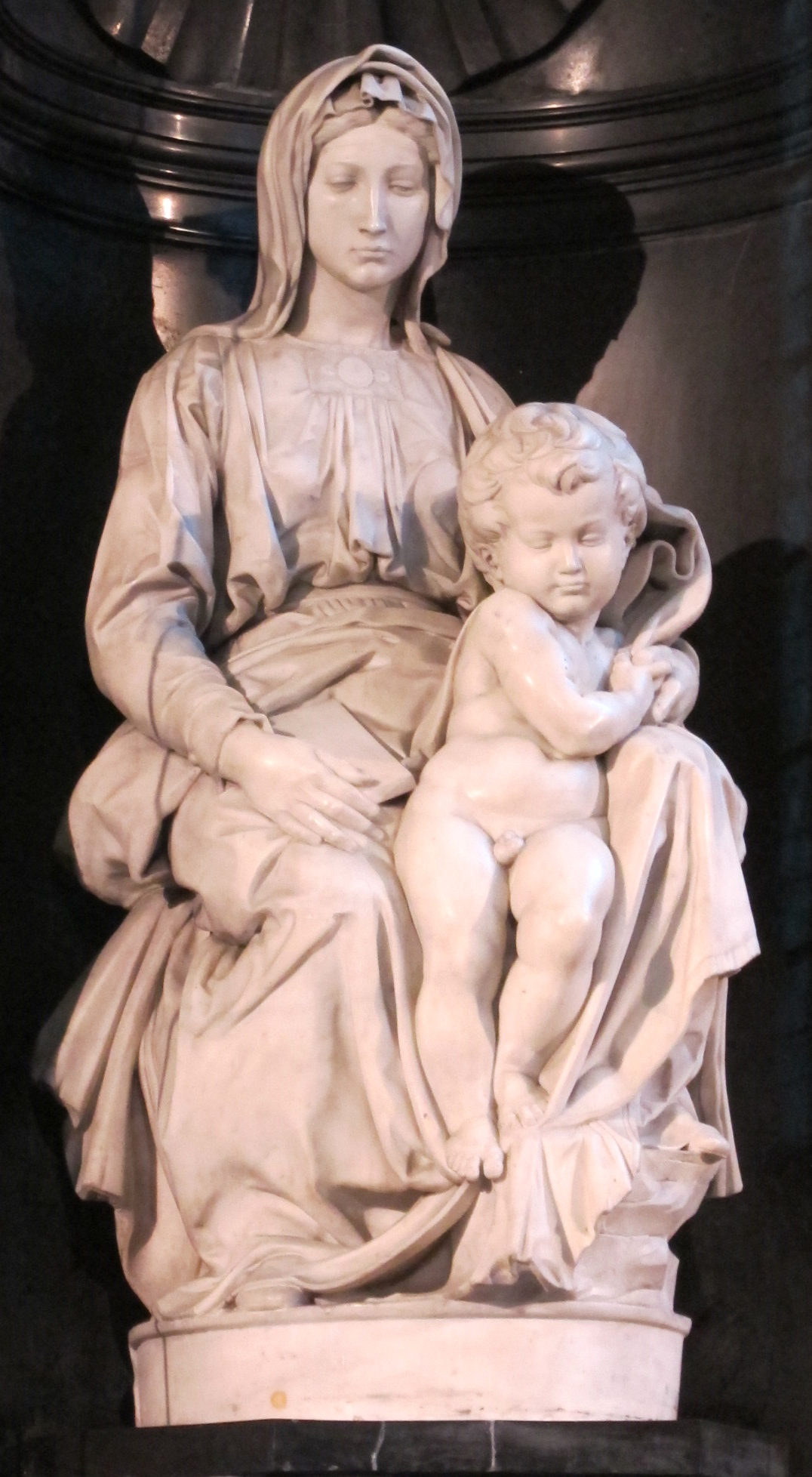 Chiesa di nostra signora, bruges, int., madonna di bruges